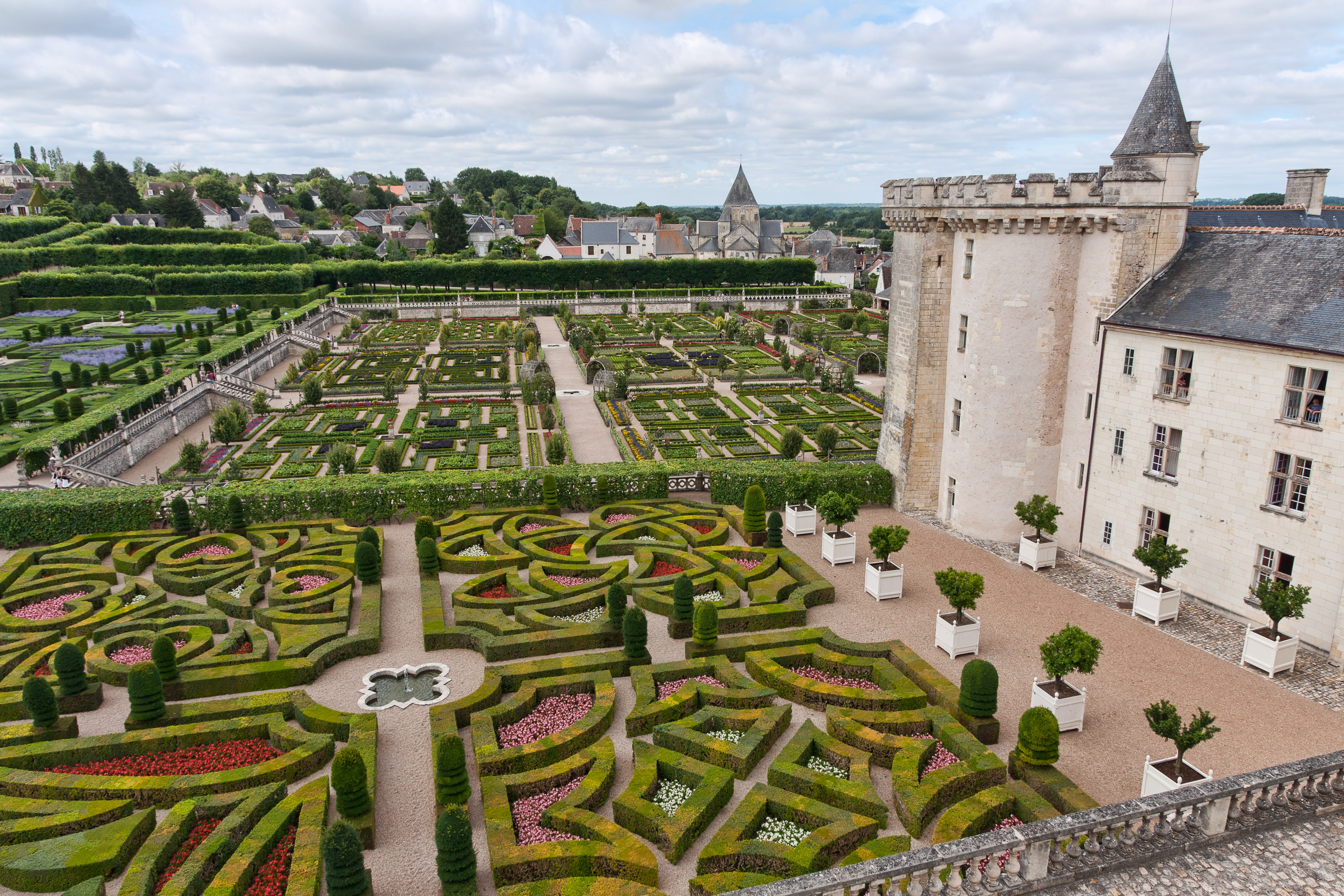 Chateau de Villandry. Vue du château et des jardins